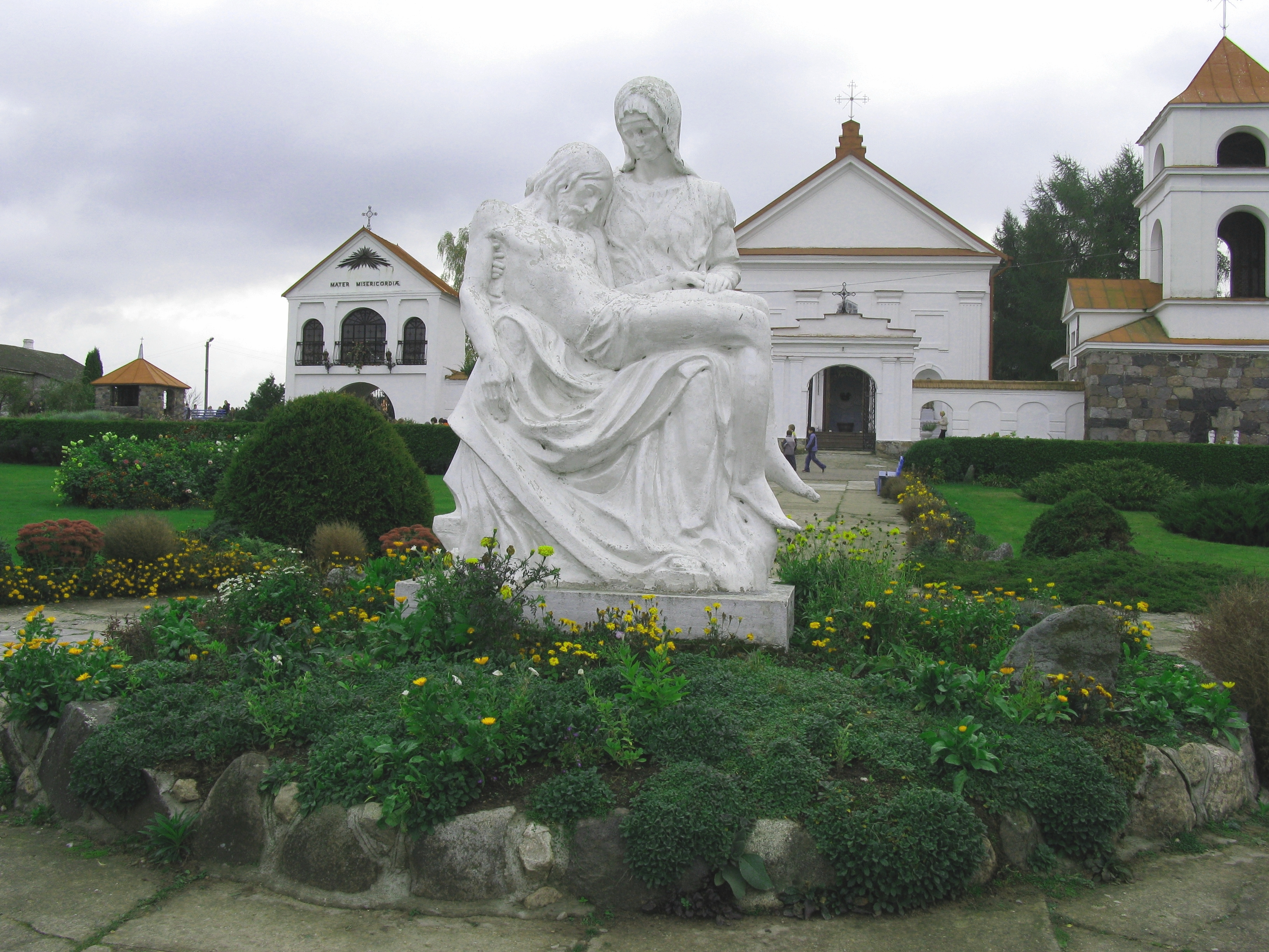 Беларуская (тарашкевіца): Касьцёл сьв. Ганны, 10 сюжэтных барэльефаў у інтэр’еры касьцёла. в. Мосар This is a photo of Belarusian heritage monument. Reference number: 212Г000397 ( WLM)